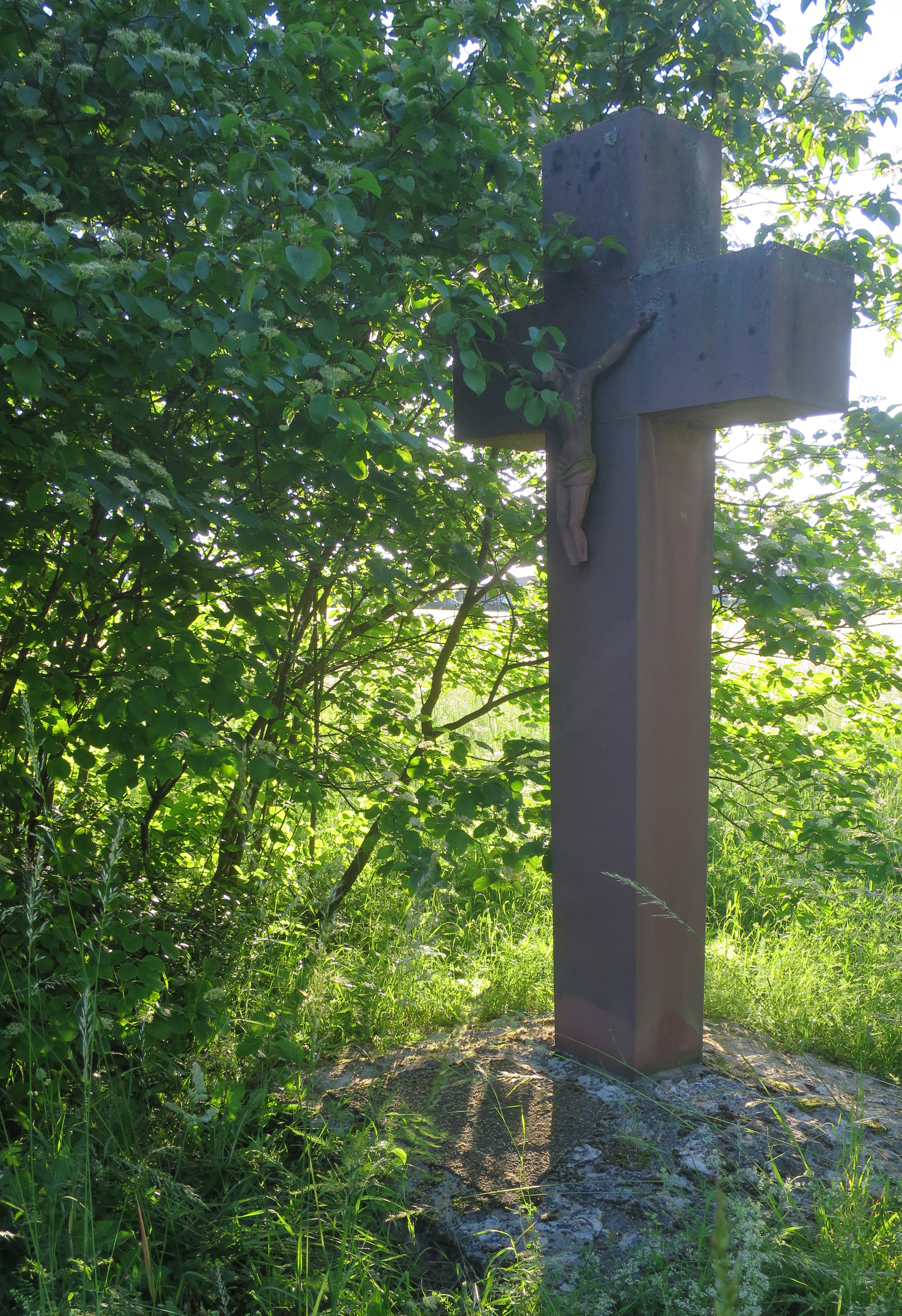 Gedenkkreuz für den BÜ-Unfall in Worms Abenheim am 24. Juli 1954